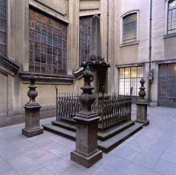 O túmulo de Júlio Frank, em um dos pátios das Arcadas da Faculdade de Direito do Largo São Francisco. O túmulo está na no prédio principal, Largo de São Francisco, 95.